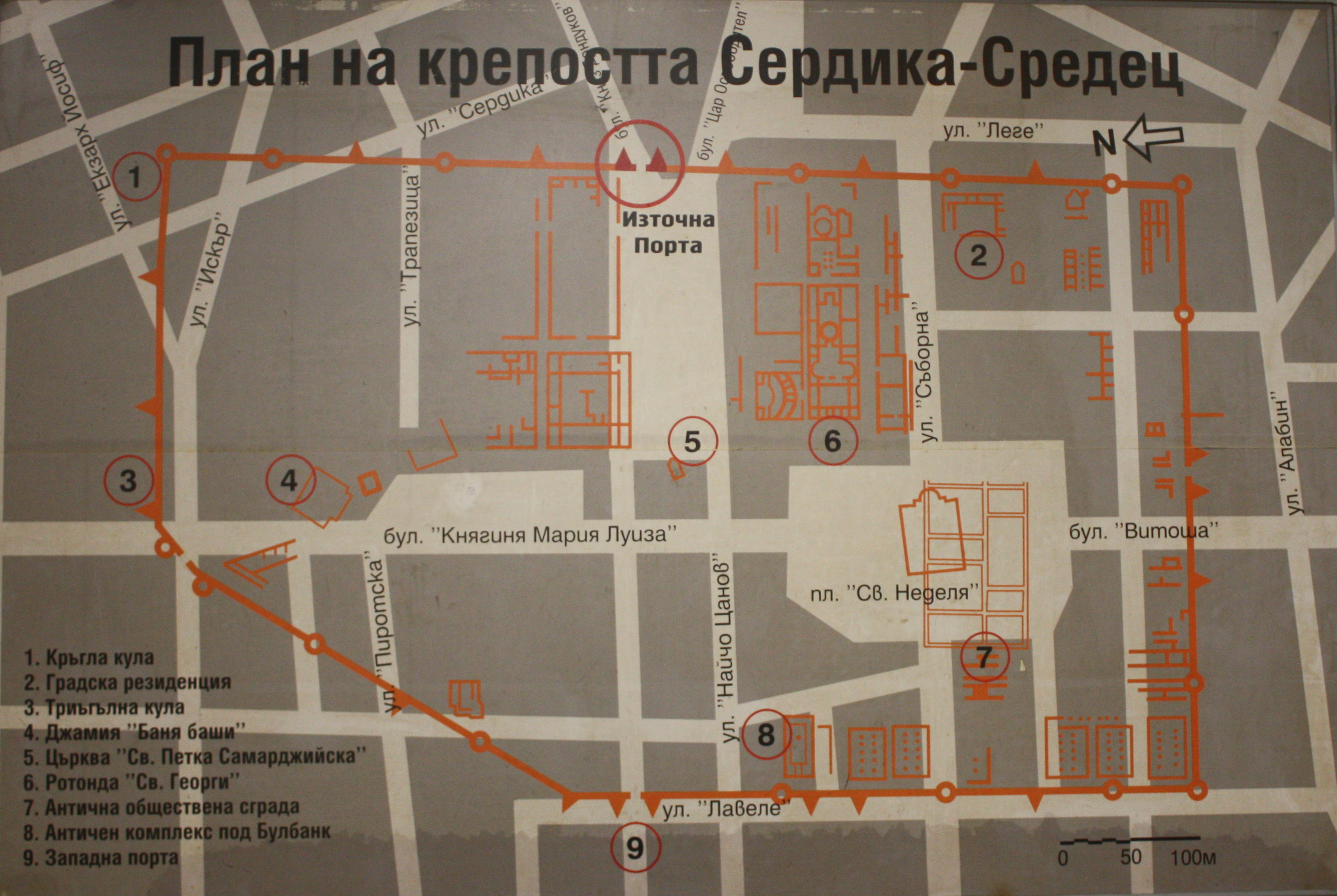 95 Serdica Fortress, Sofia, Bulgaria, Festung Sercica, Сердика